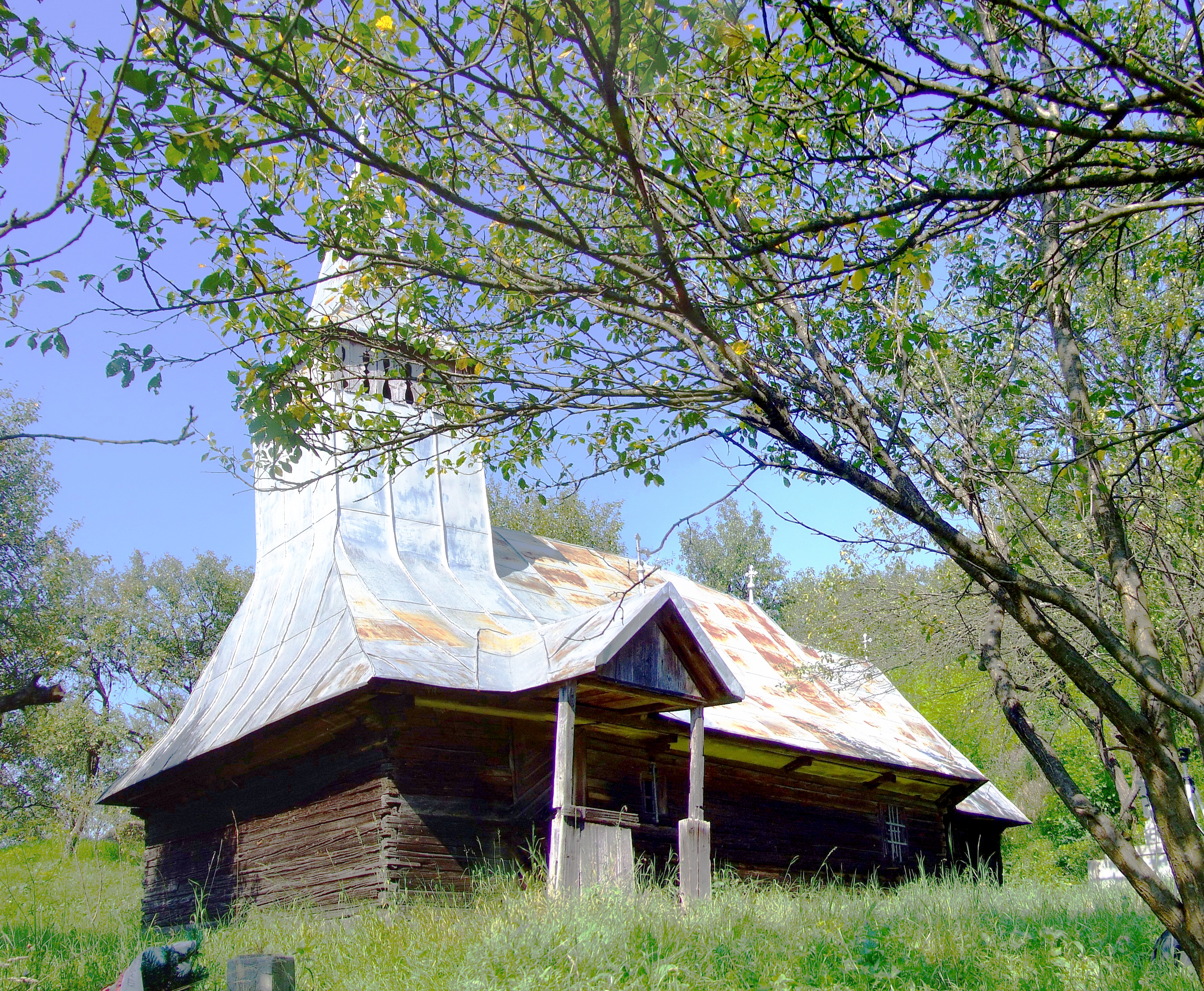 Biserica de lemn din Silivaş (Biserici de lemn din Cluj)